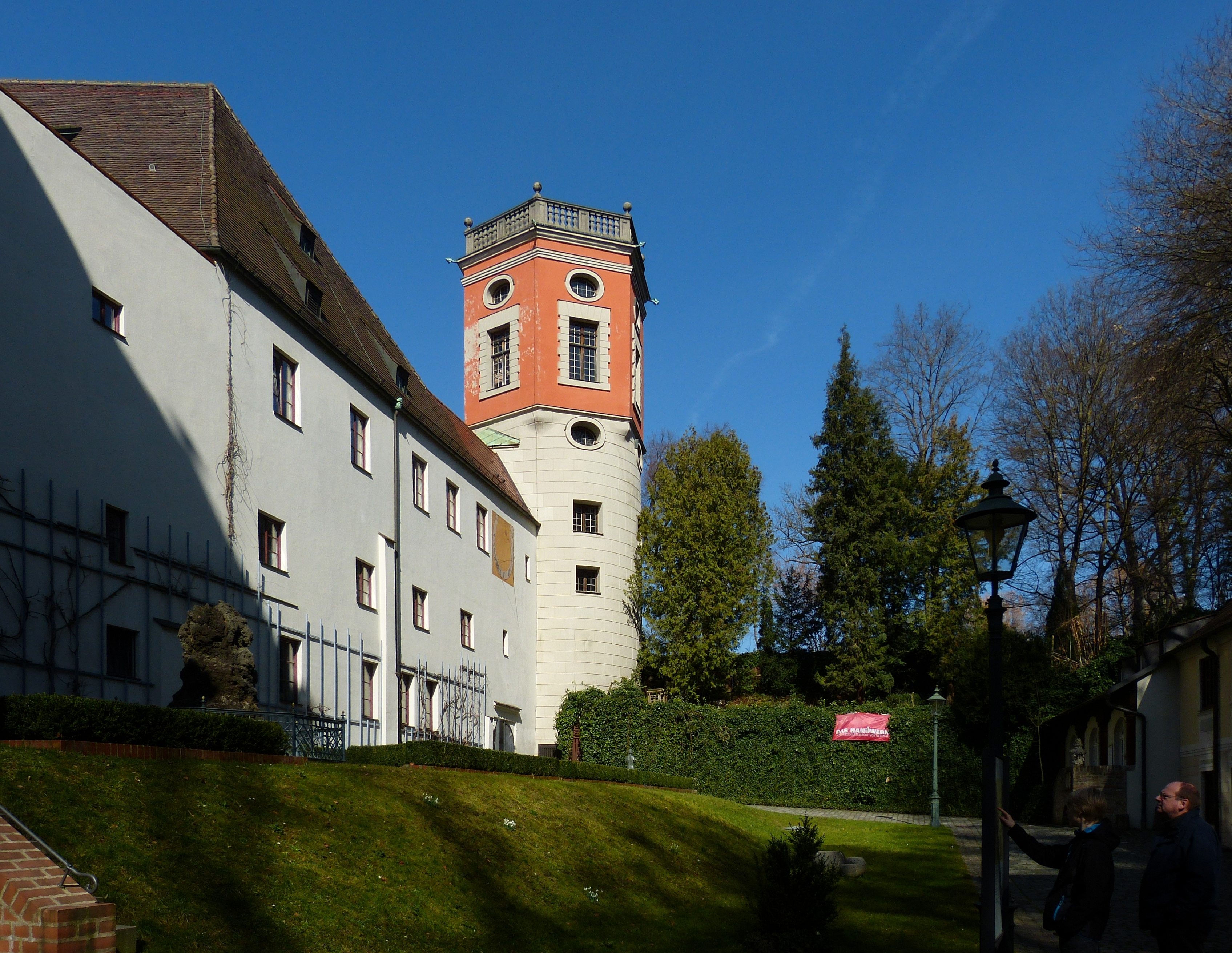 Der Kastenturm in Augsburg, vom Handwerkerhof aus gesehen.